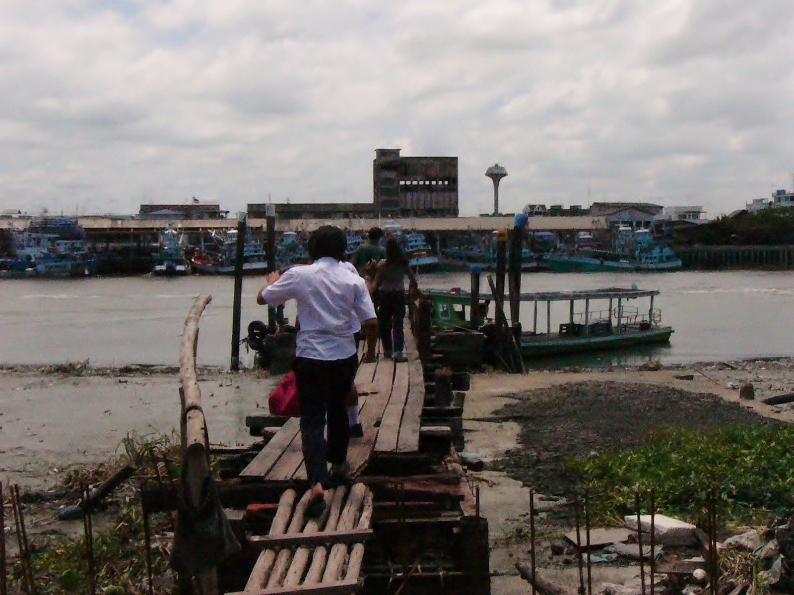 マハーチャイと結ぶ渡し船乗り場。駅に隣接している。